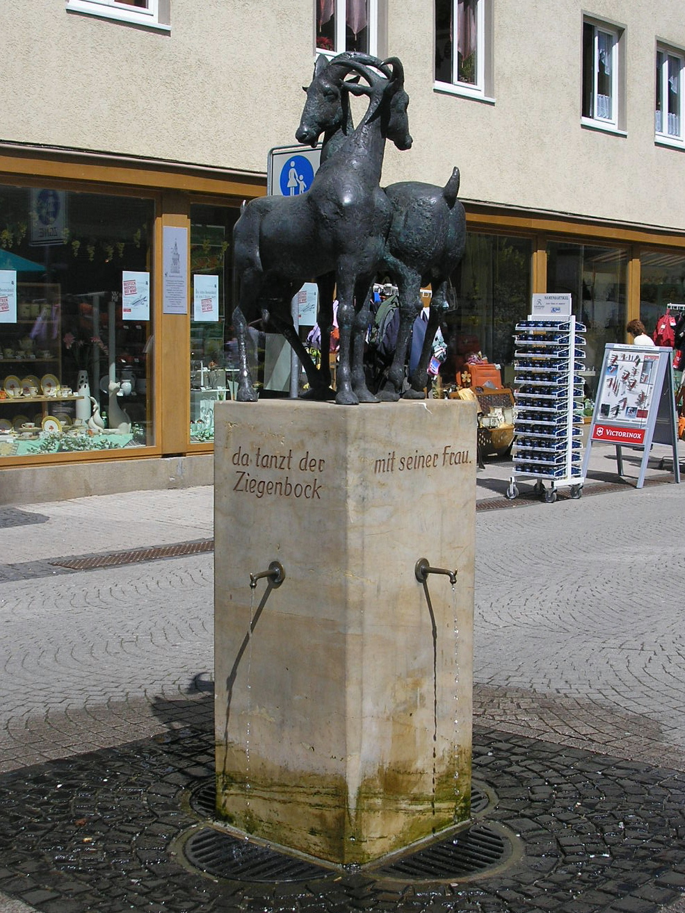 Der Ziegenbrunnen von Volkmar Kühn in Ilmenau (Thüringen). Neben der Henne ist die Ziege das zweite Ilmenauer "Wappentier".